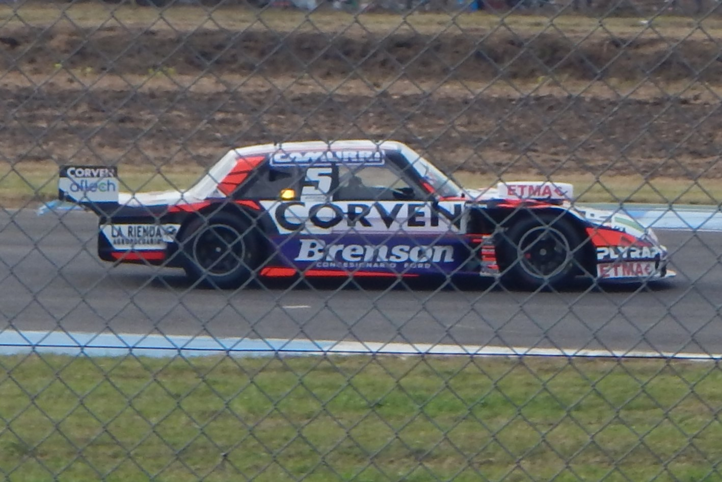 Matías Rossi, TC Rafaela 2019.